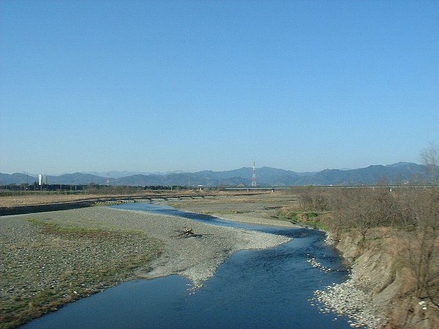 神流川 埼玉県児玉郡ja:上里町のJR高崎線（神保原～新町）車内から